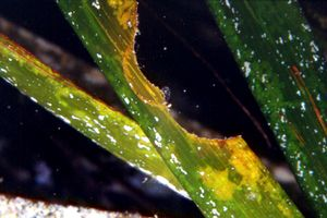 Foglie di Posidonia oceanica con evidenti segni di erbivoria.